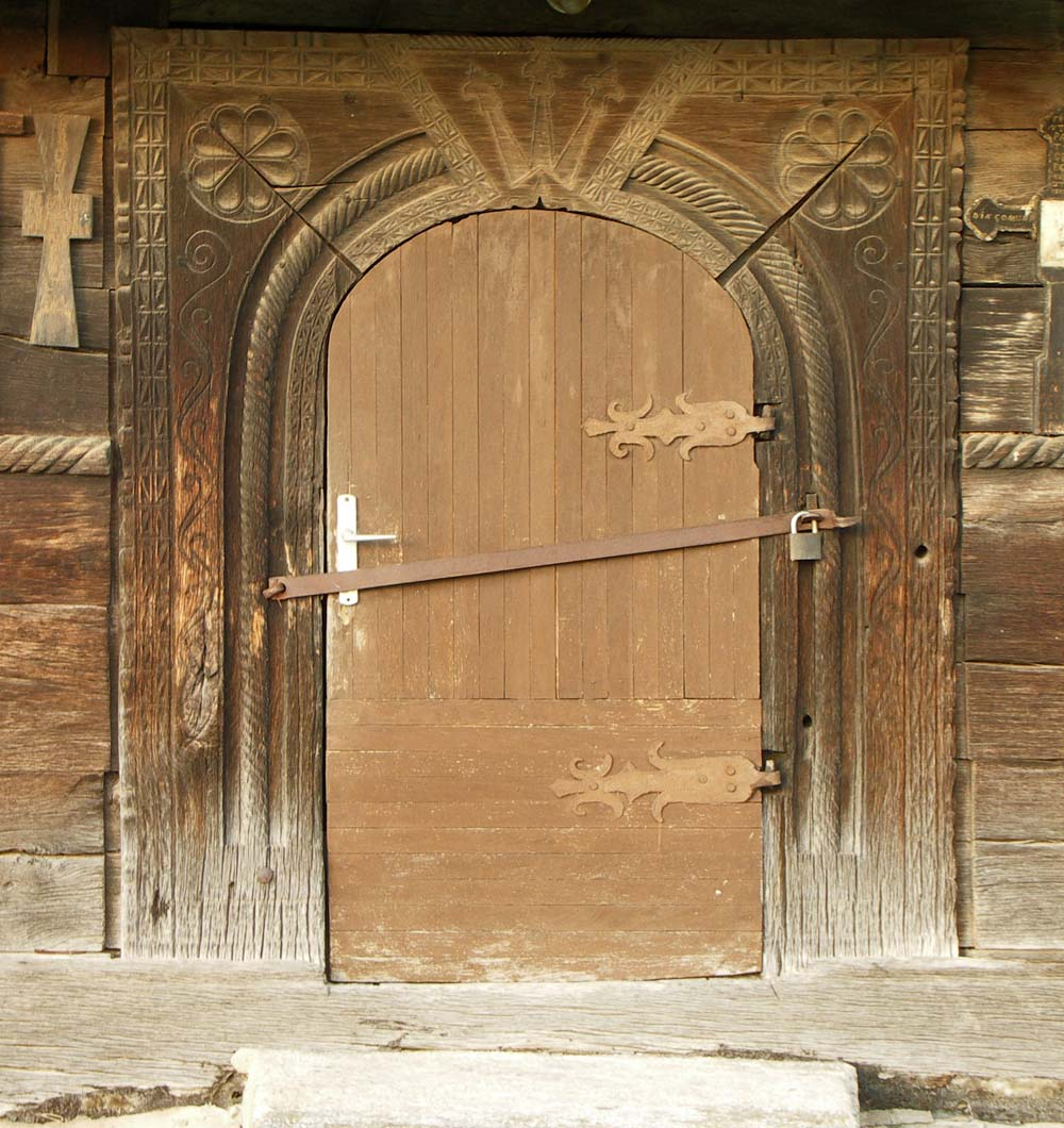 Biserica de lemn din Şebiş, Bihor. Portalul de la intrare.